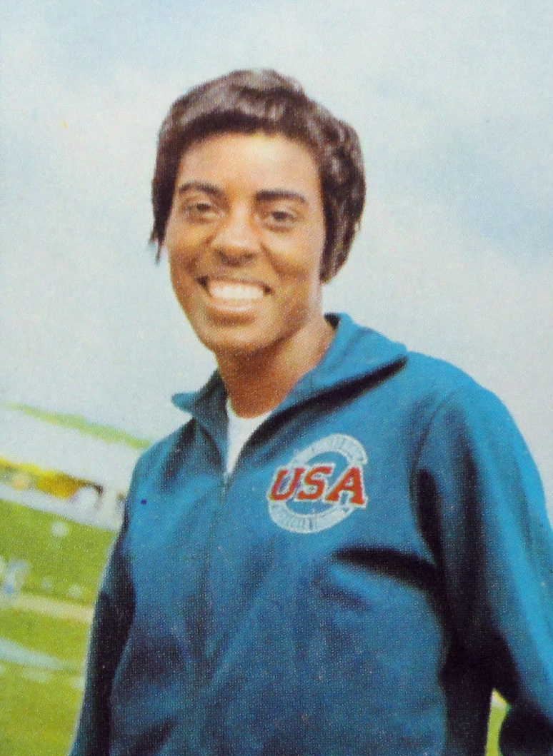 CAMPIONI DELLO SPORT 1969/70-n.92-TYUS (USA)-ATLETICA LEGG.